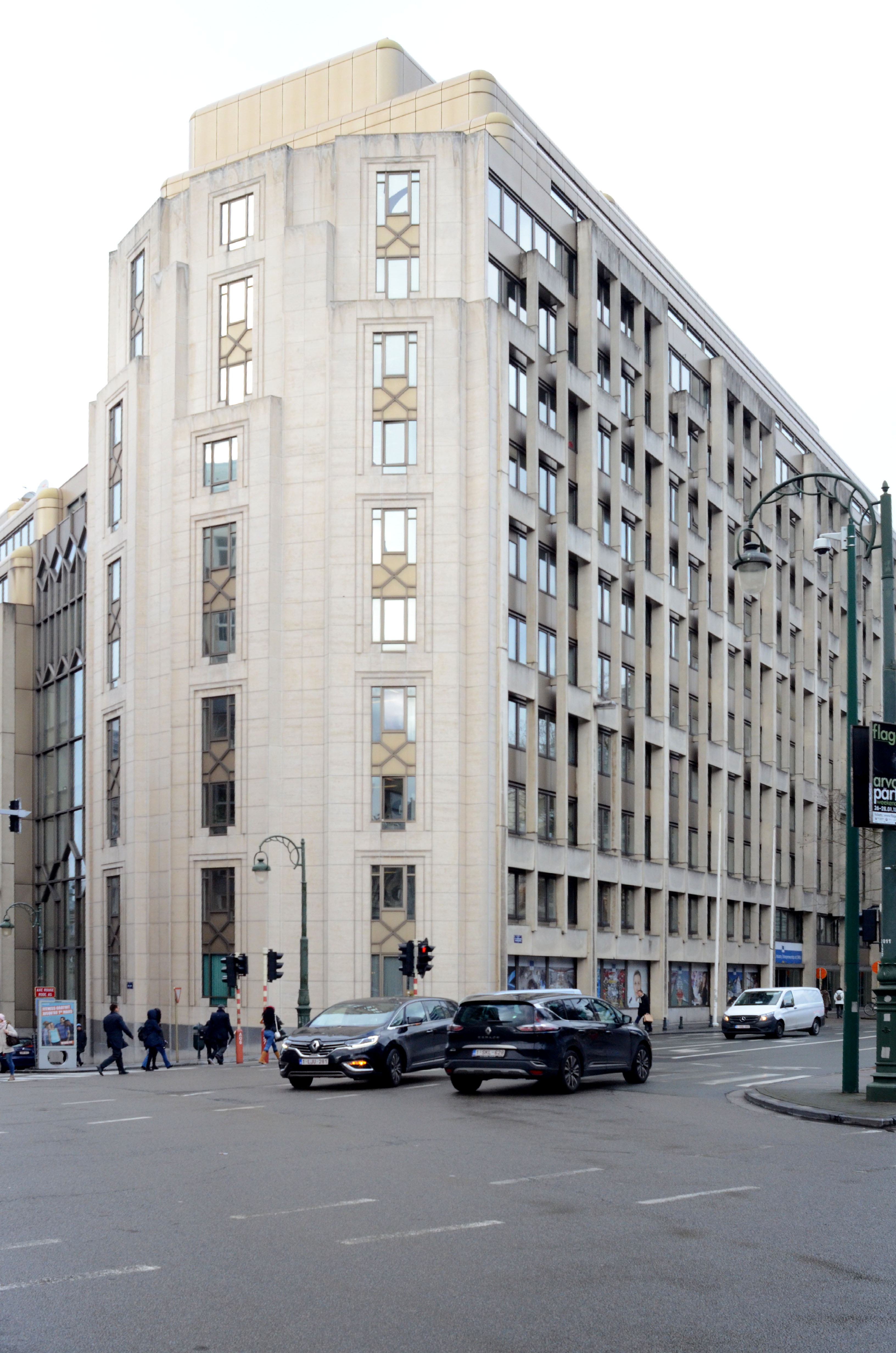 Cet immeuble de bureau a été conçu par les architectes André et Jean Polak, à Bruxelles